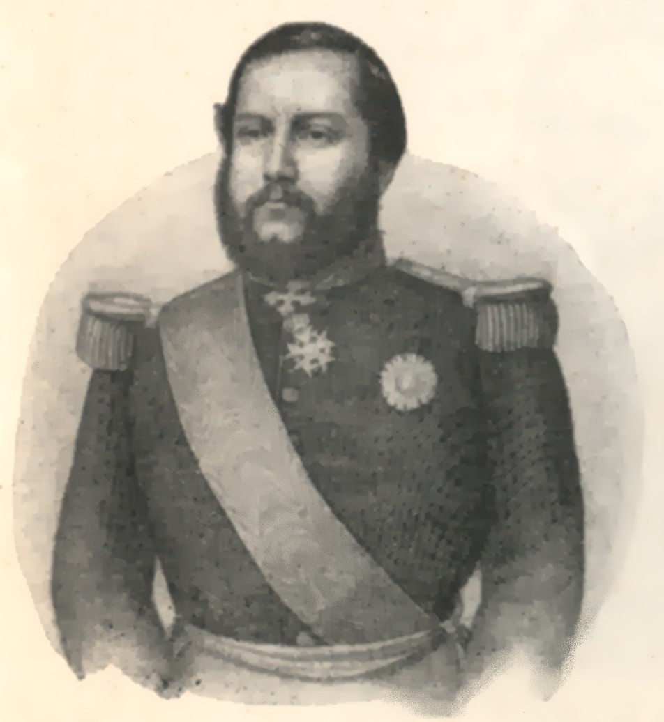 Francisco Solano López, Paraguayan commander.